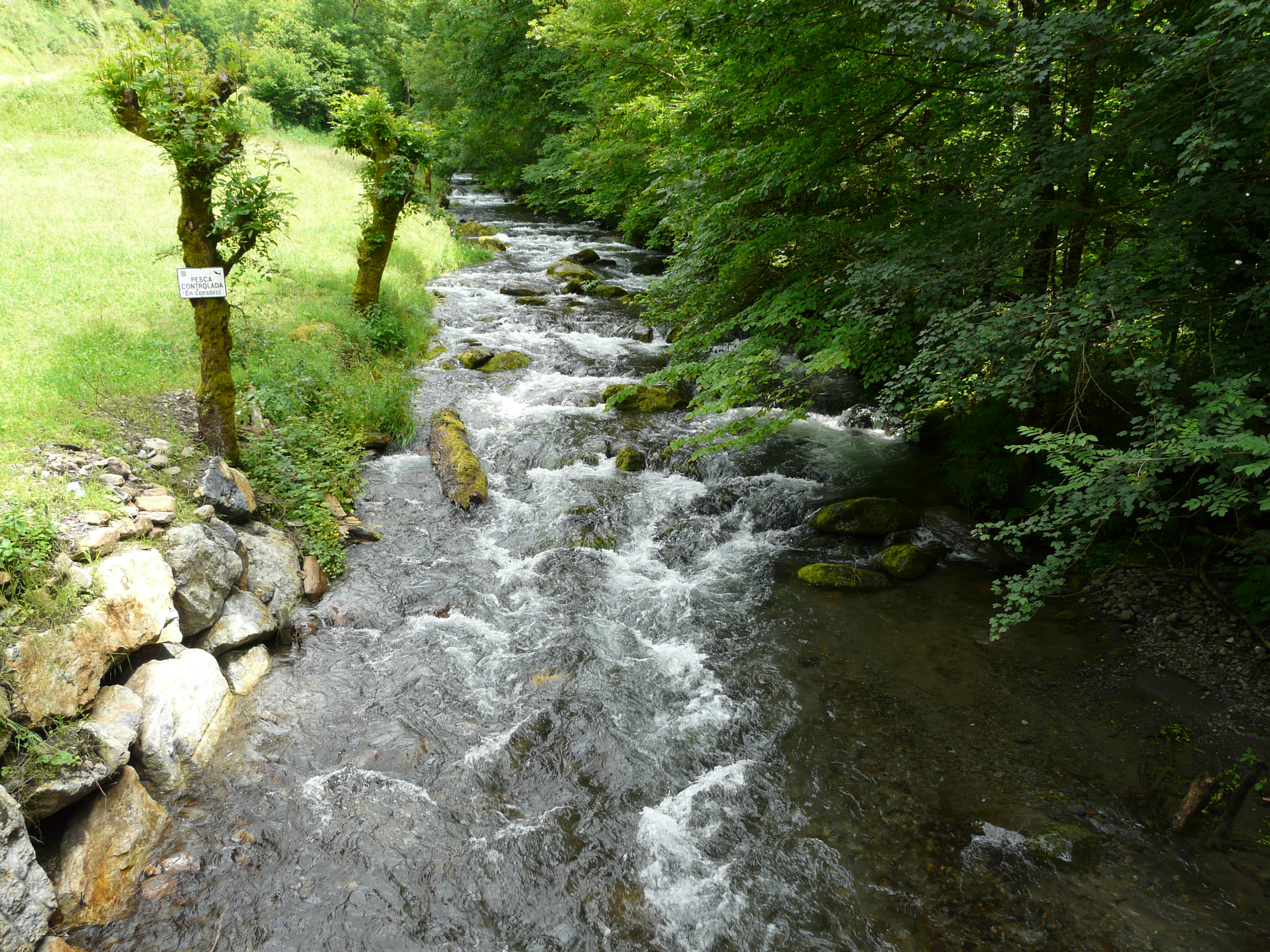 Le río Toran en amont du pont routier menant à Canejan, Val d'Aran, Catalogne, Espagne.